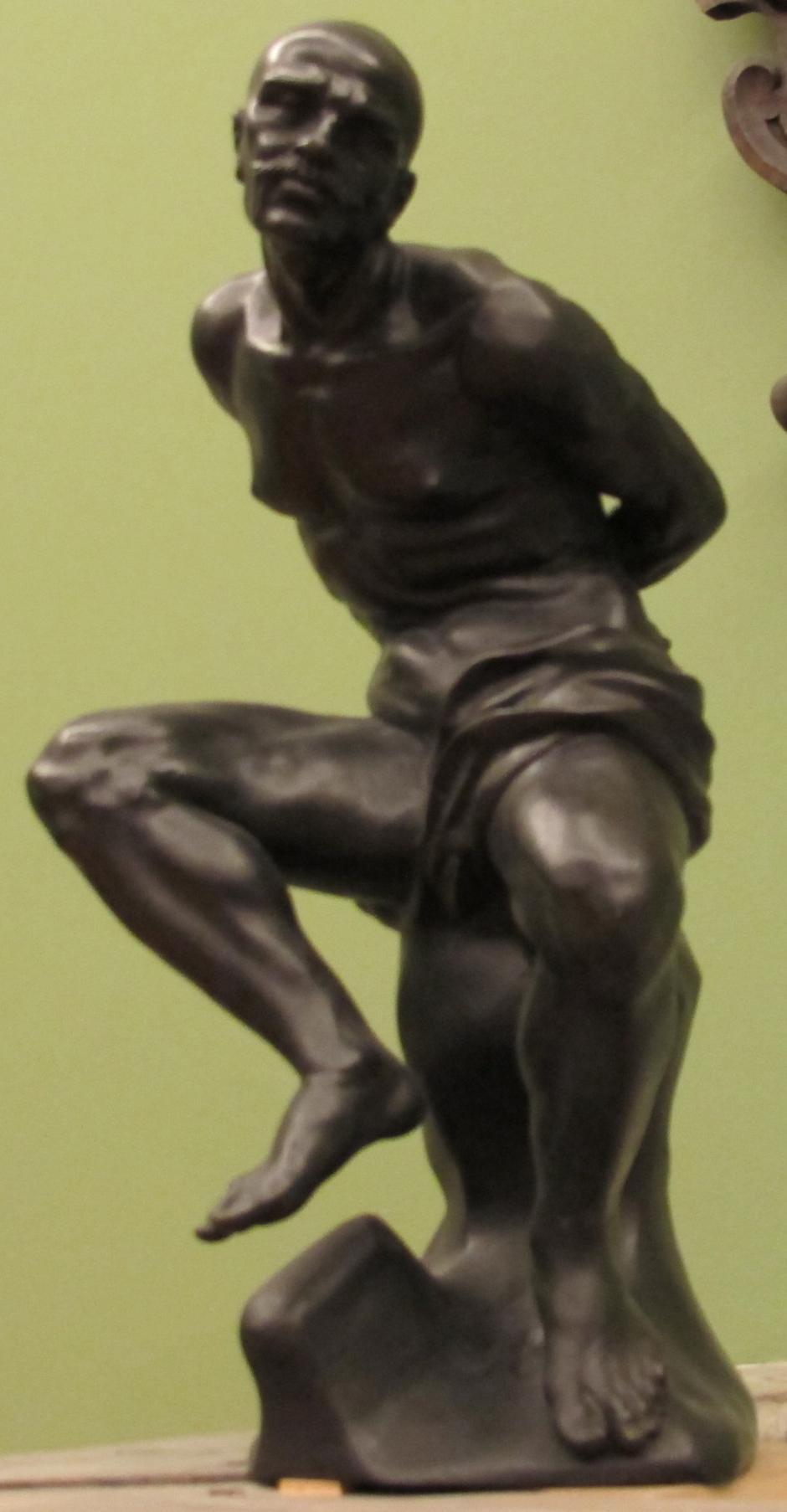 Giovan battista foggini, corsaro legato